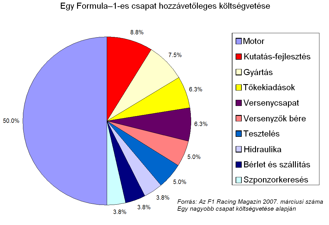 Egy Formula–1-es csapat költségvetése